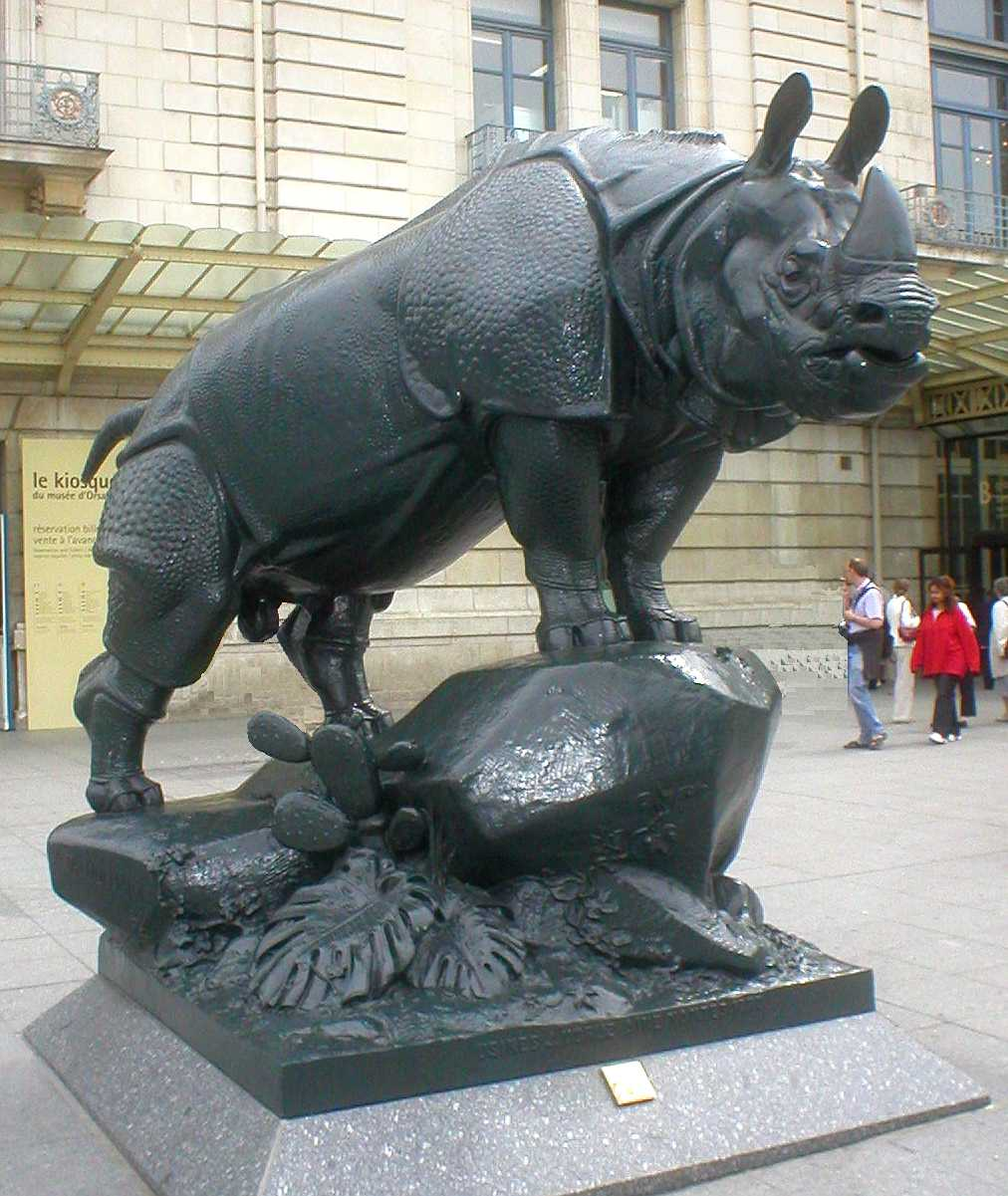 "Rhinocéros", fonte de fer réalisée pour l'Exposition Universelle de Paris 1878, actuellement sur le parvis du Musée d'Orsay Alfred Jacquemart Prise de vue personnelle 17 mai 2006 Siren-Com 22:19, 17 May 2006 (UTC)